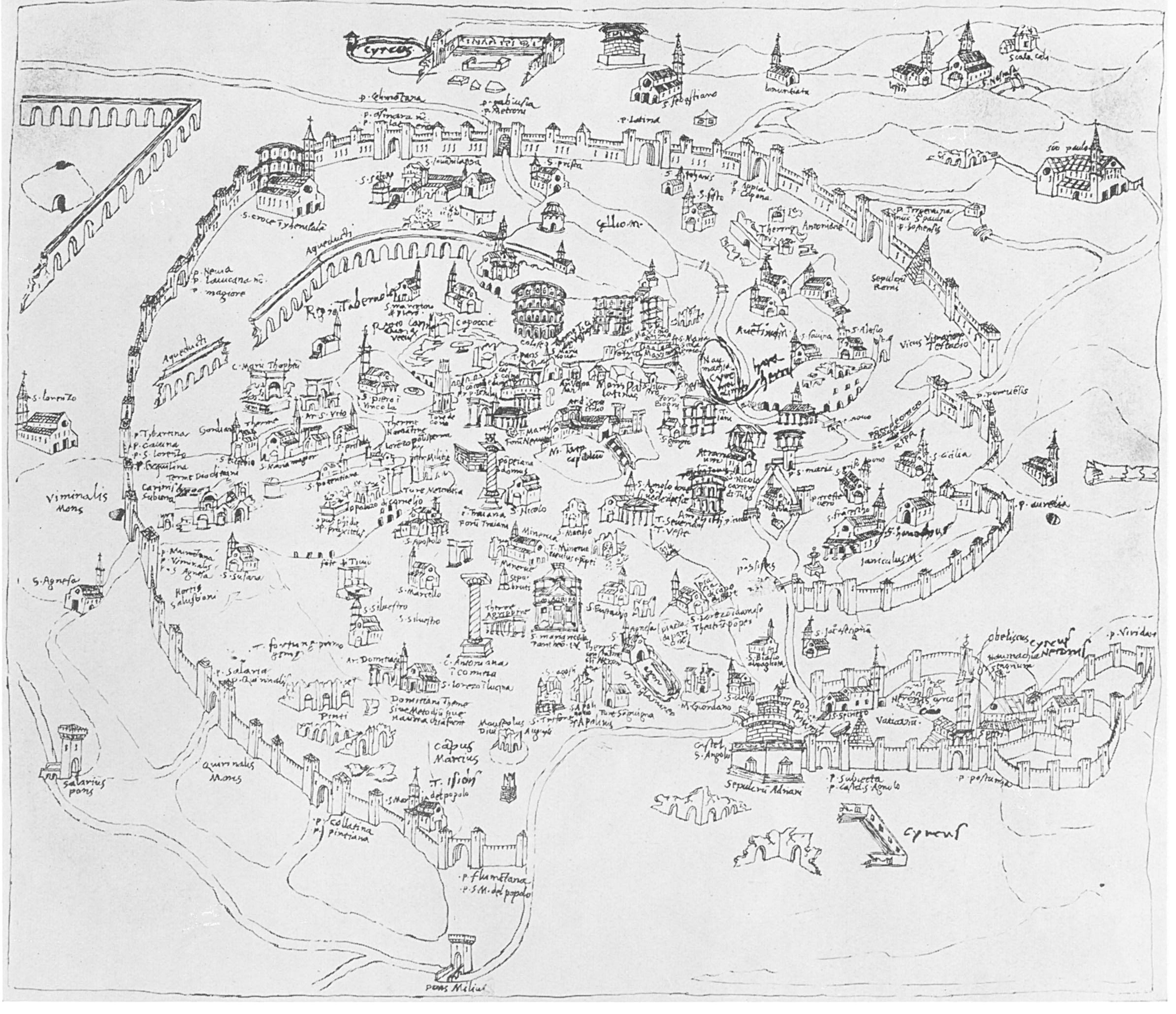 Alessandro Strozzi, Pianta di Roma, in Res priscae variaque antiquitatis monumenta undique ex omni orbe conlecta, Firenze, Biblioteca Medicea Laurenziana, cod. Redi 77, ff. VIIv- VIIIr.